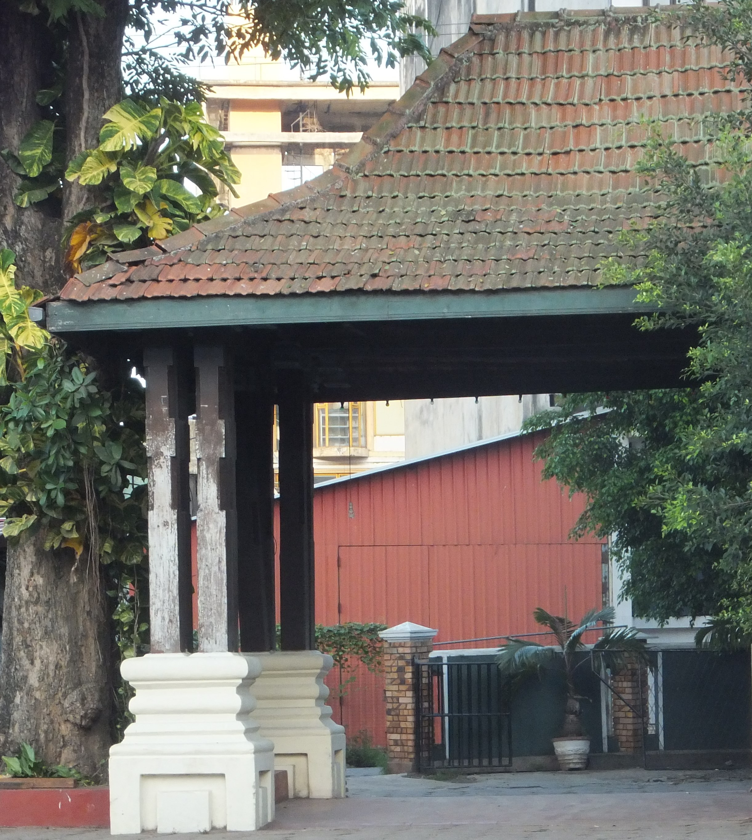 සිංහල: කුරුණෑගල නගර මධ්‍යයේ ඇති ක්‍රි.ව.14වන සියවසට අයත් මඟුල් මඩුව